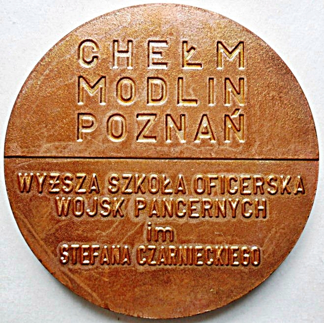 Medal pamiątkowy WSOWP